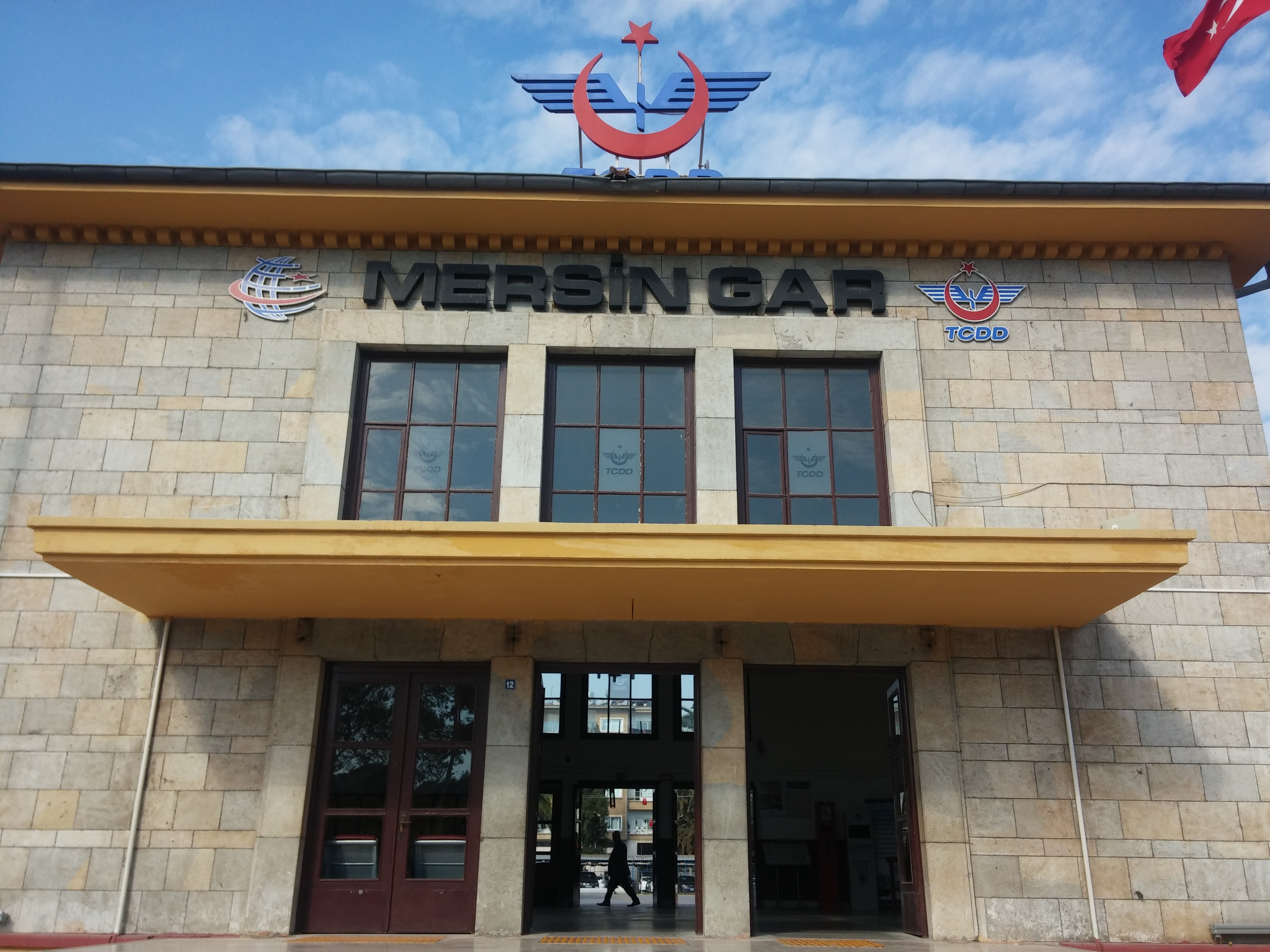 Mersin Gar girişi.